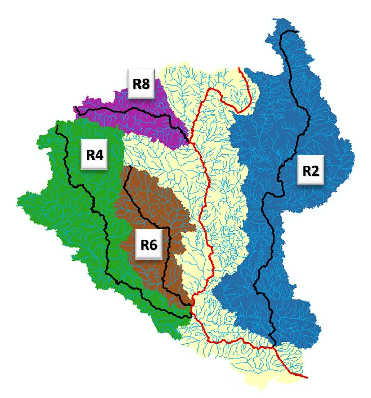 Códigos de Otto Pfafstetter dos quatro maiores tributários do Rio Trombetas